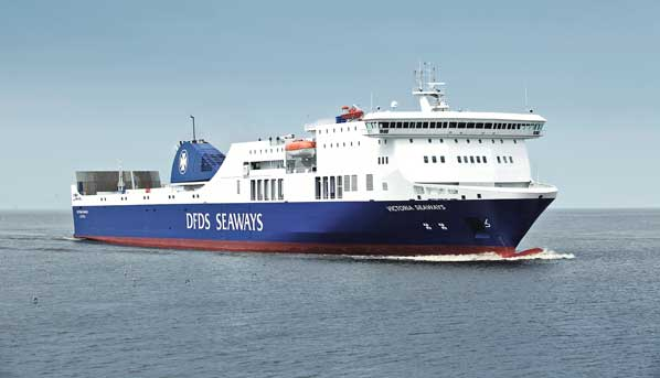 Victoria Seaways